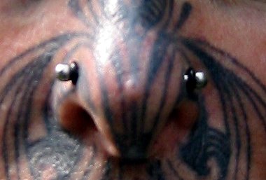 nasallang